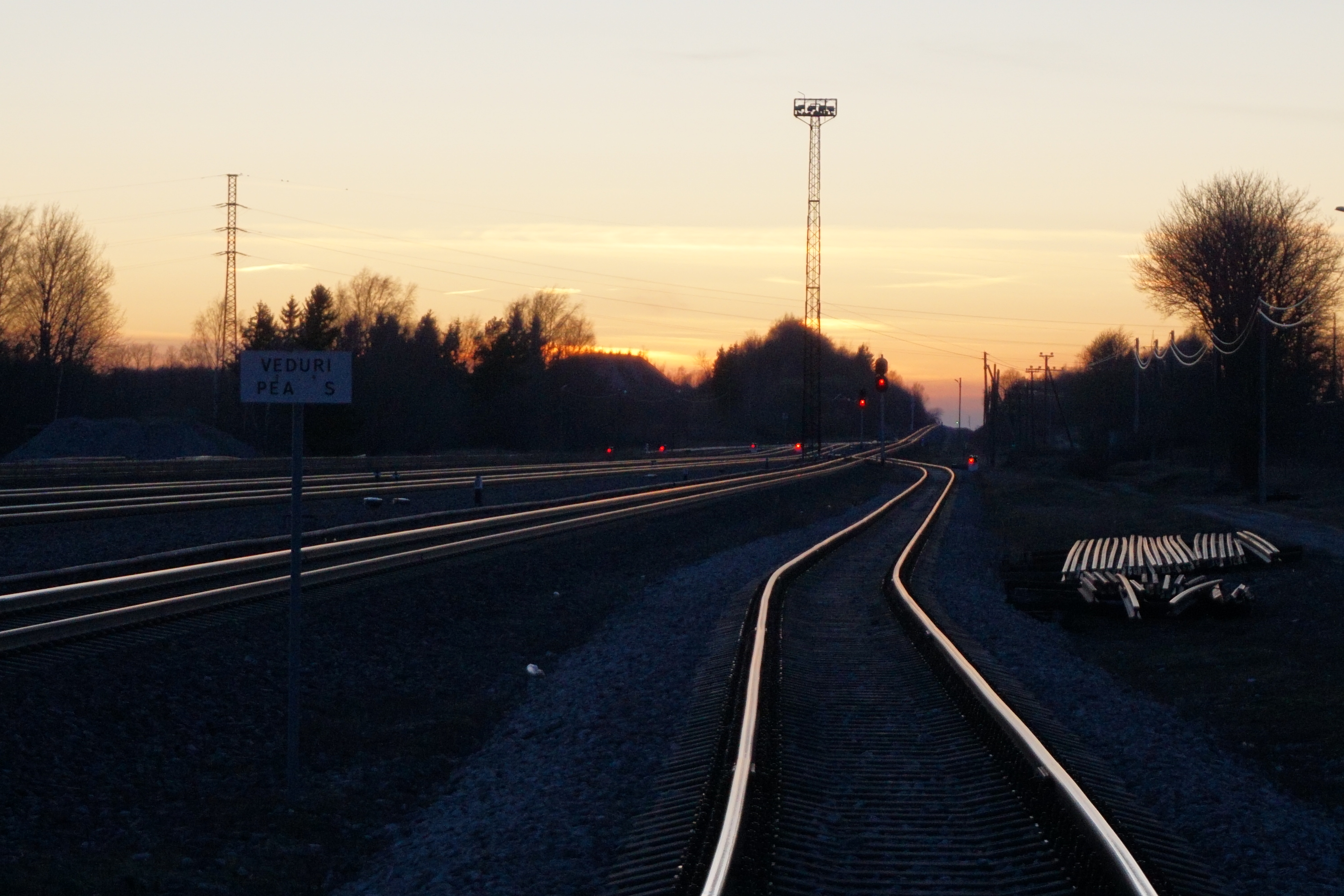 Jõhvi raudteejaam vaatega Tallinna suunal.